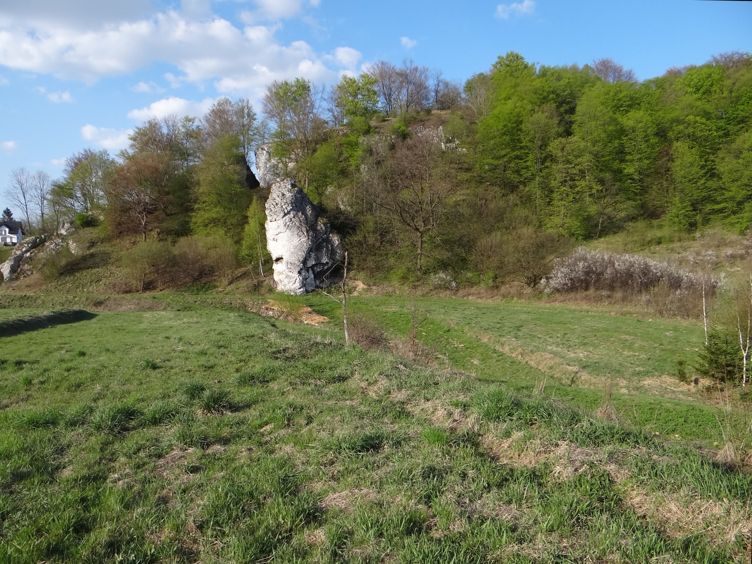 Rogożowa Turnia w grupie Rogożowej Skały w Przegini. Nad nią skały Brama